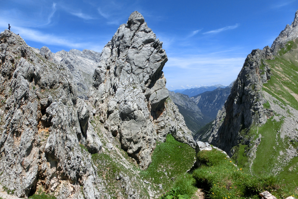 Fels nahe dem Grenzübergang "Gatterl" im Wettersteingebirge